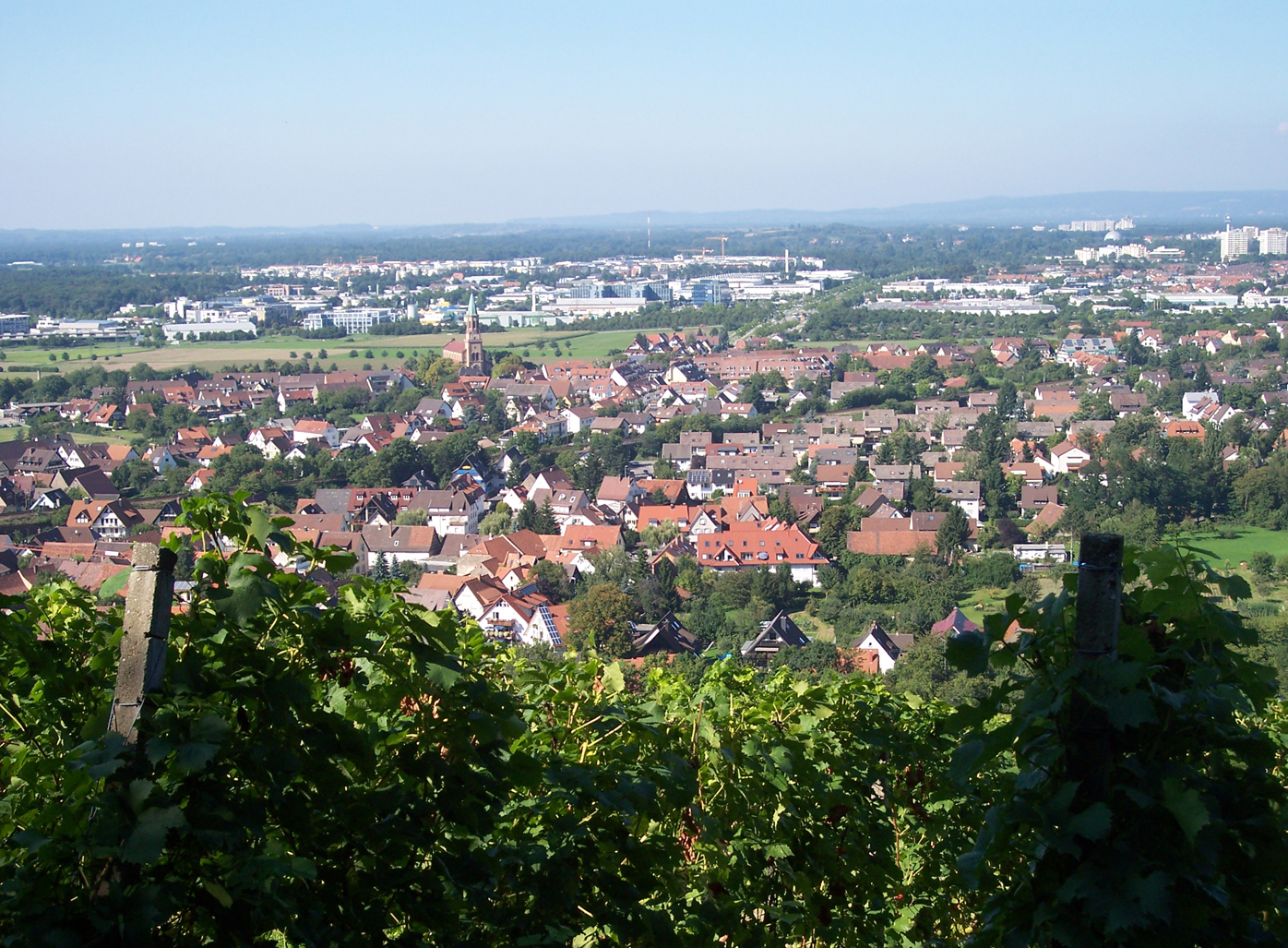 Blick vom Schönberg (Markgräflerland) auf Sankt Georgen im Breisgau, fotografiert von Autor Chalco am 31. August 2005